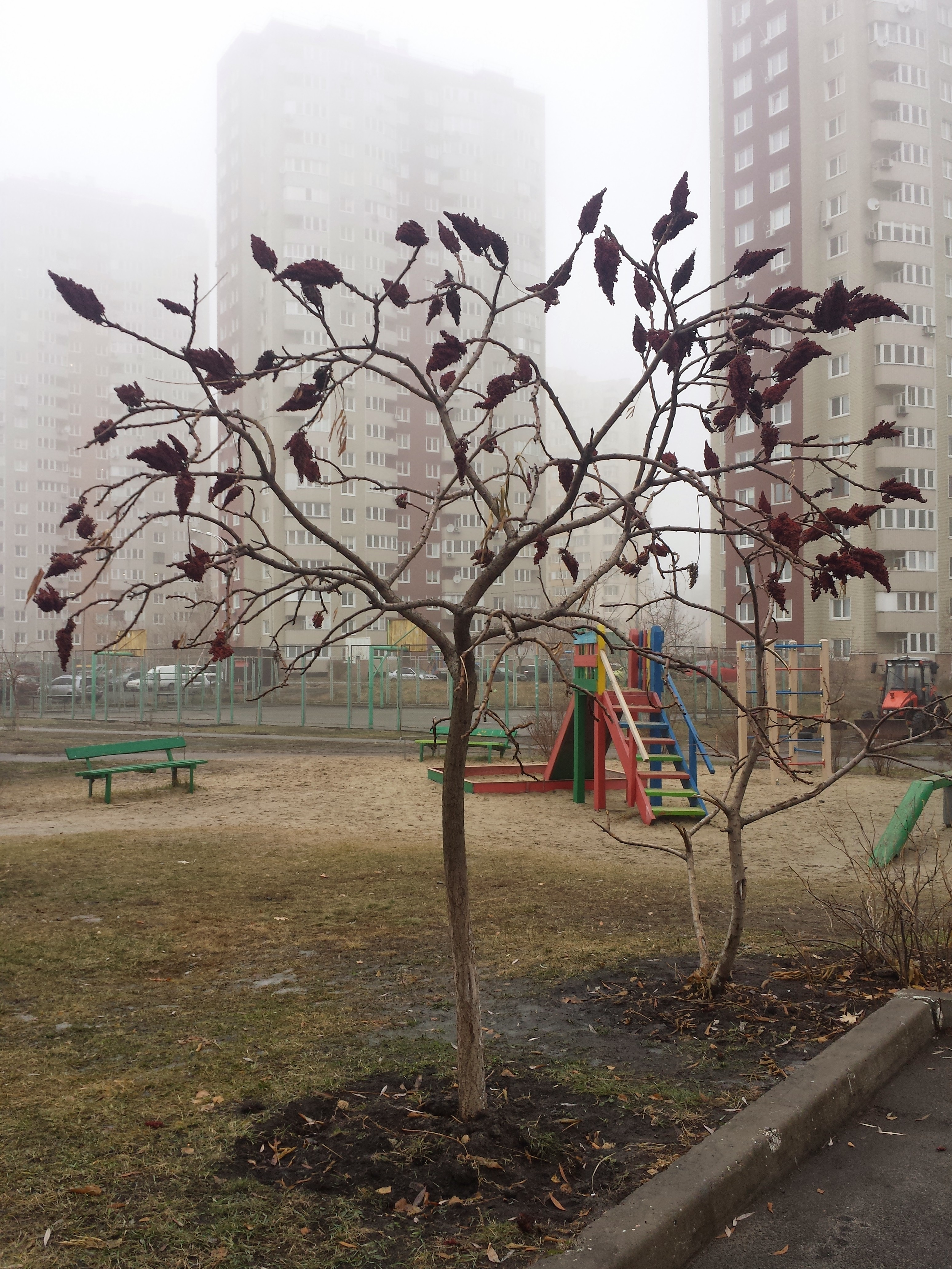 Дерево сумах взимку на Позняках